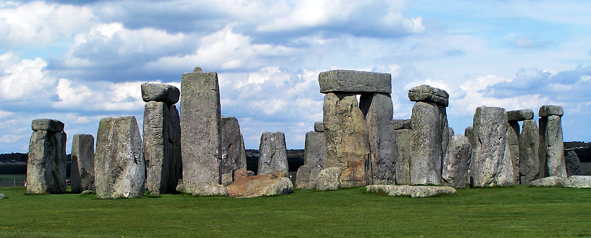 optimierte Version von "Stonehenge Totalansicht.jpg"